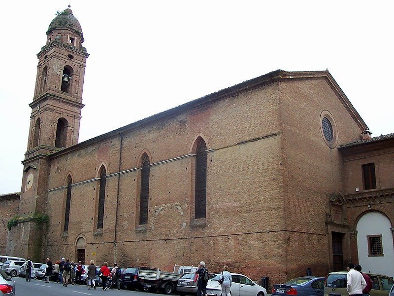 Siena - Chiesa di S. Niccolò del Carmine